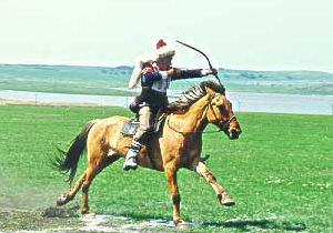 башкирский всадник